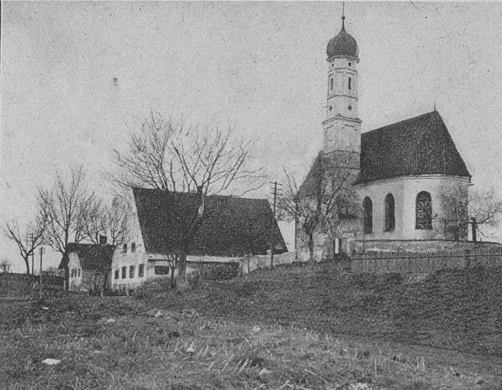 Kirche St. Johann und Leprosenheim im Weilheimer Stadtteil Töllern.